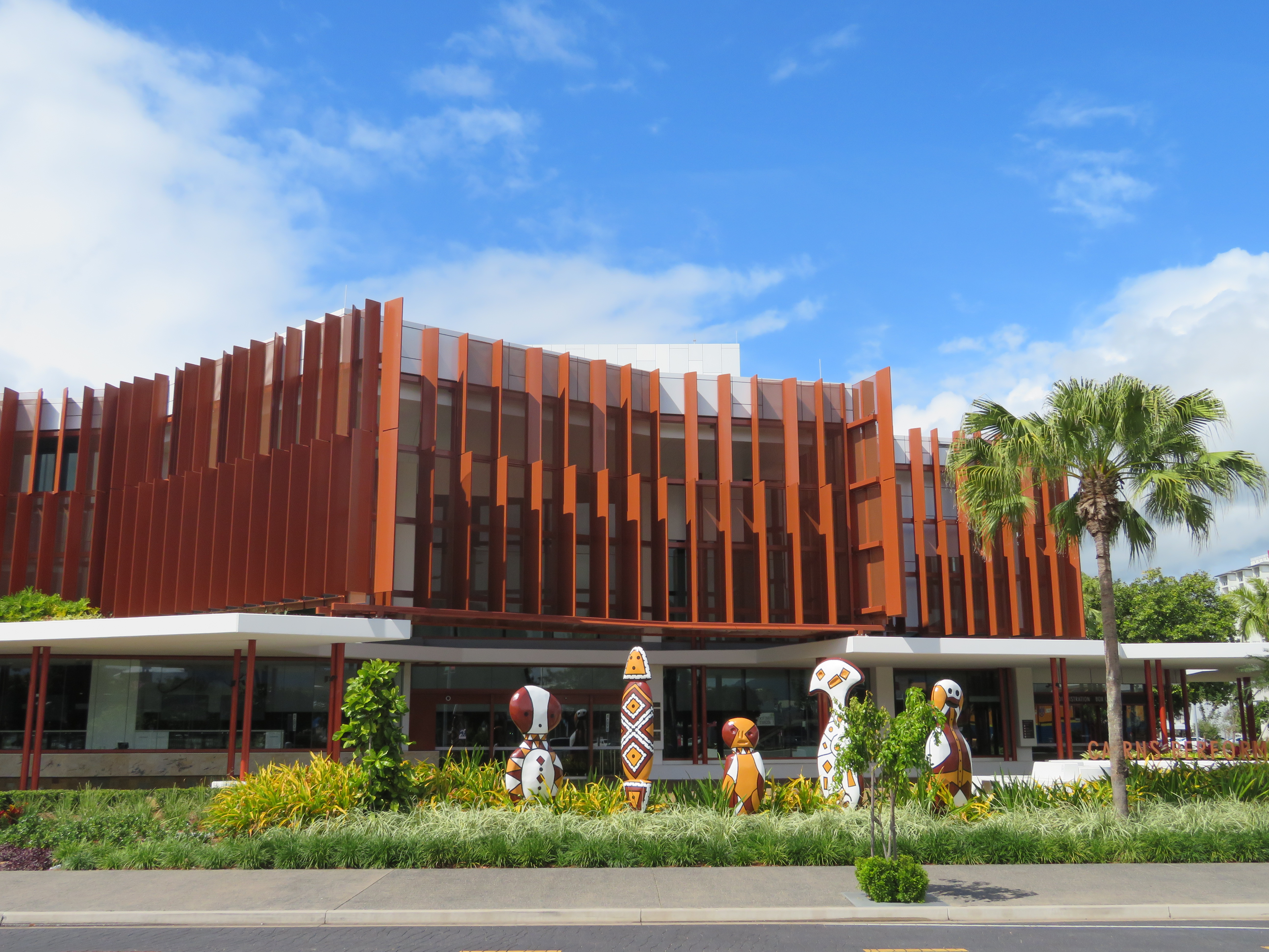 Kunsthalle, Cairns, Queensland, Australien